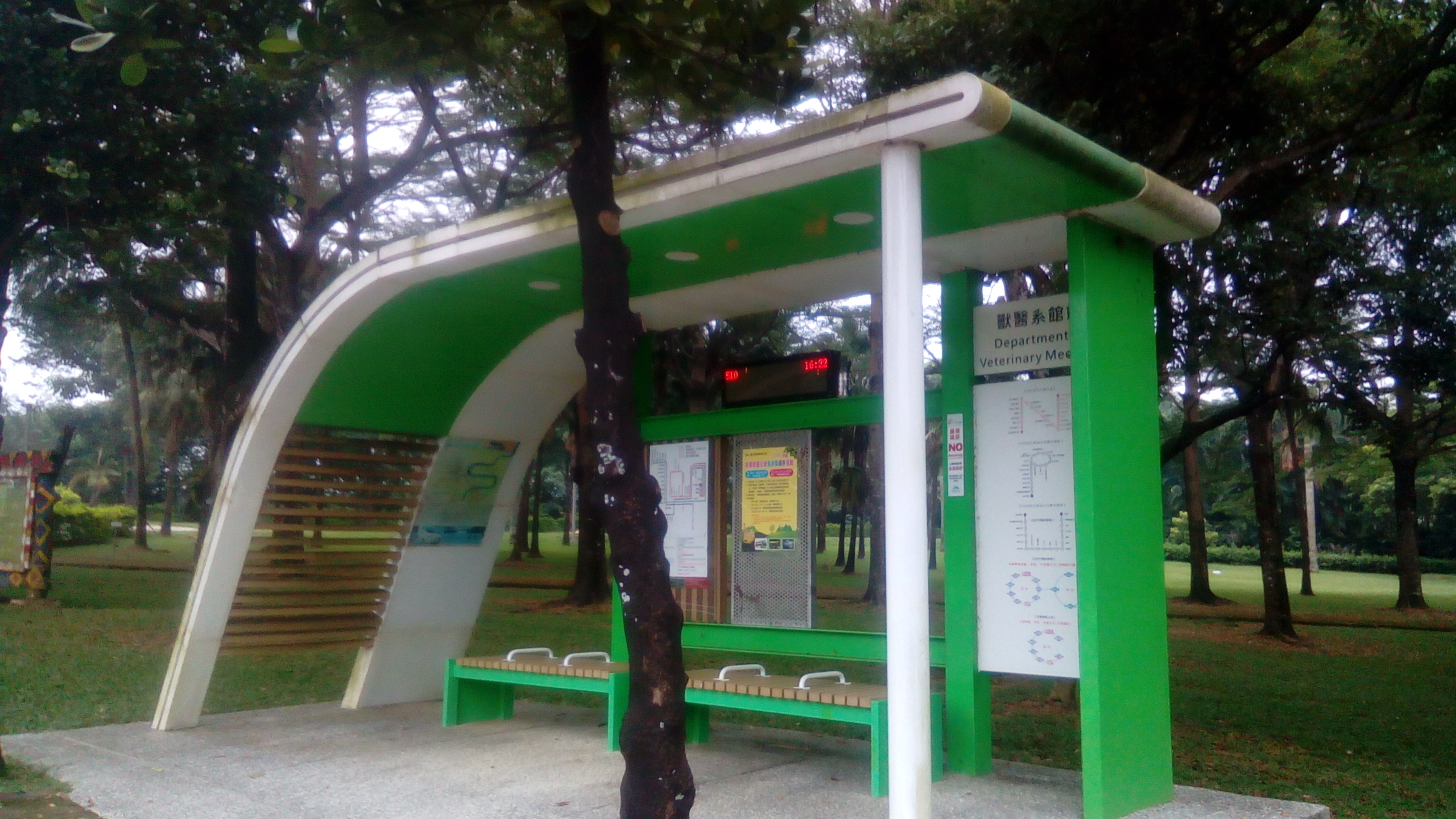 同上